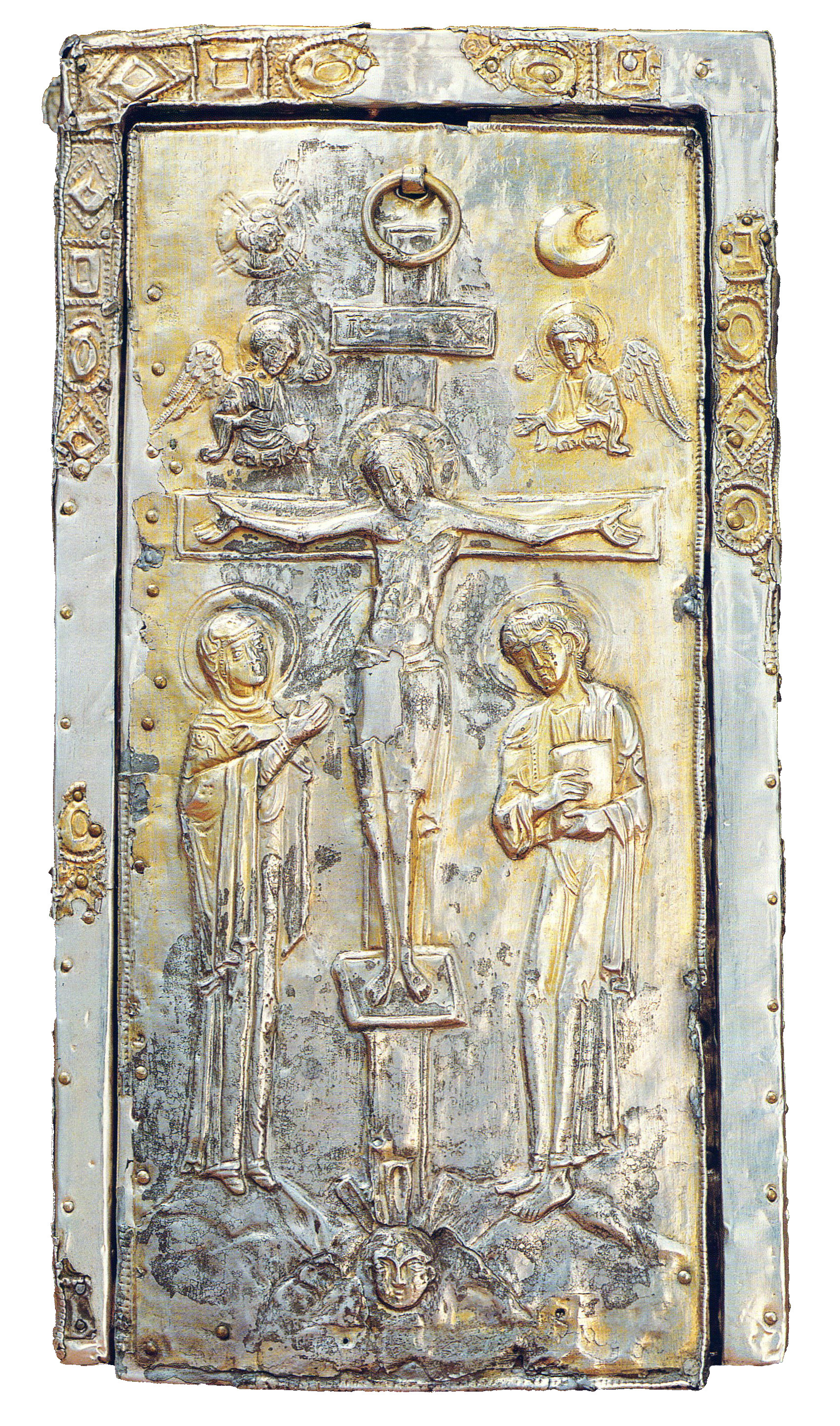 stauroteca2.jpg